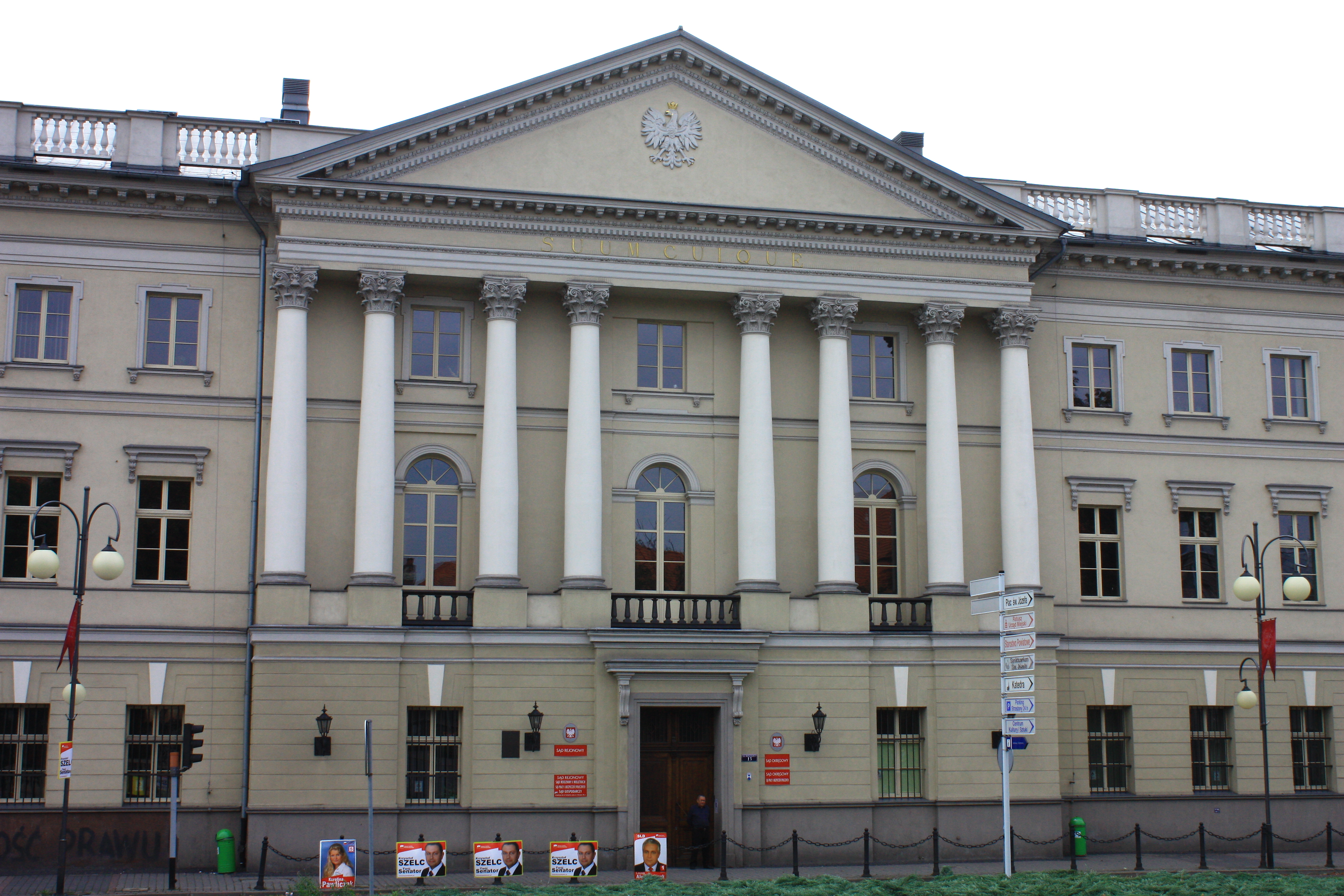 Kalisz, trybunał, ob. sąd, 1820-1824